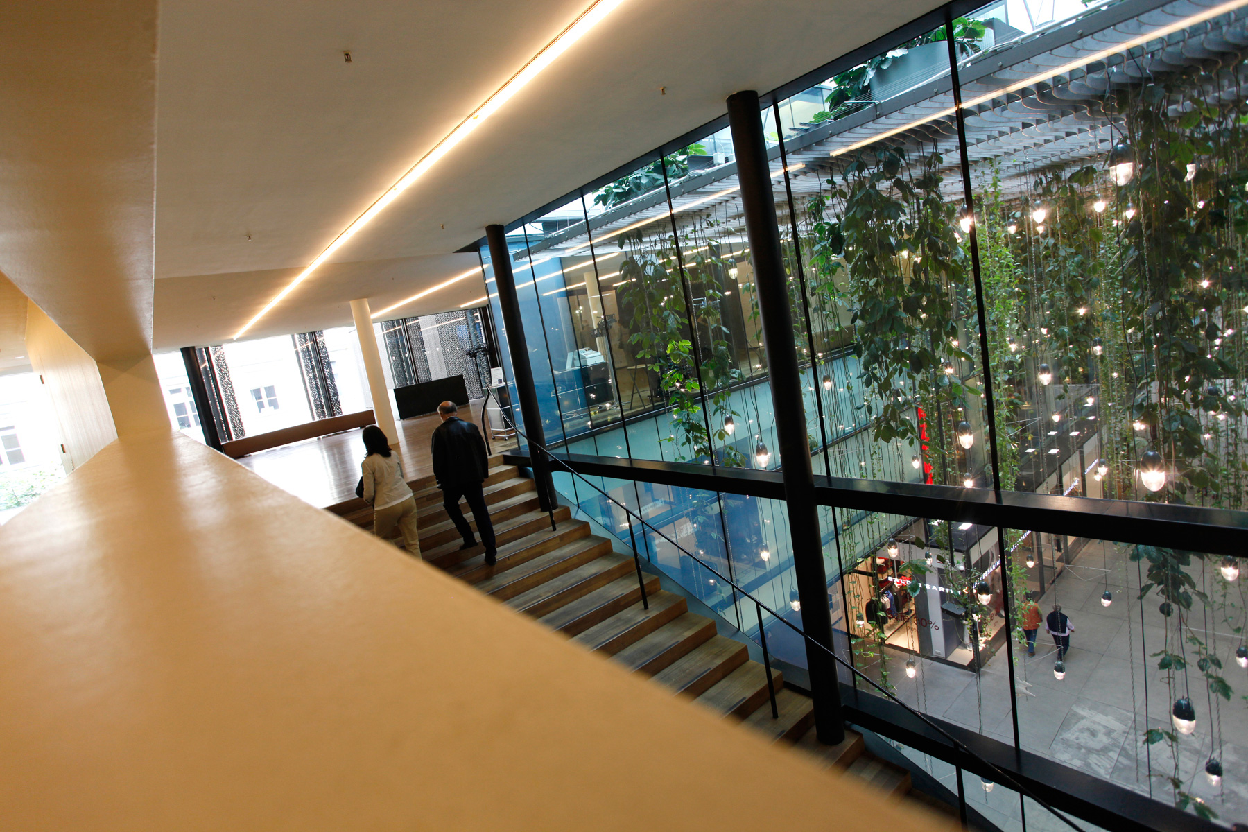 Kunsthalle der Hypo-Kulturstiftung von innen